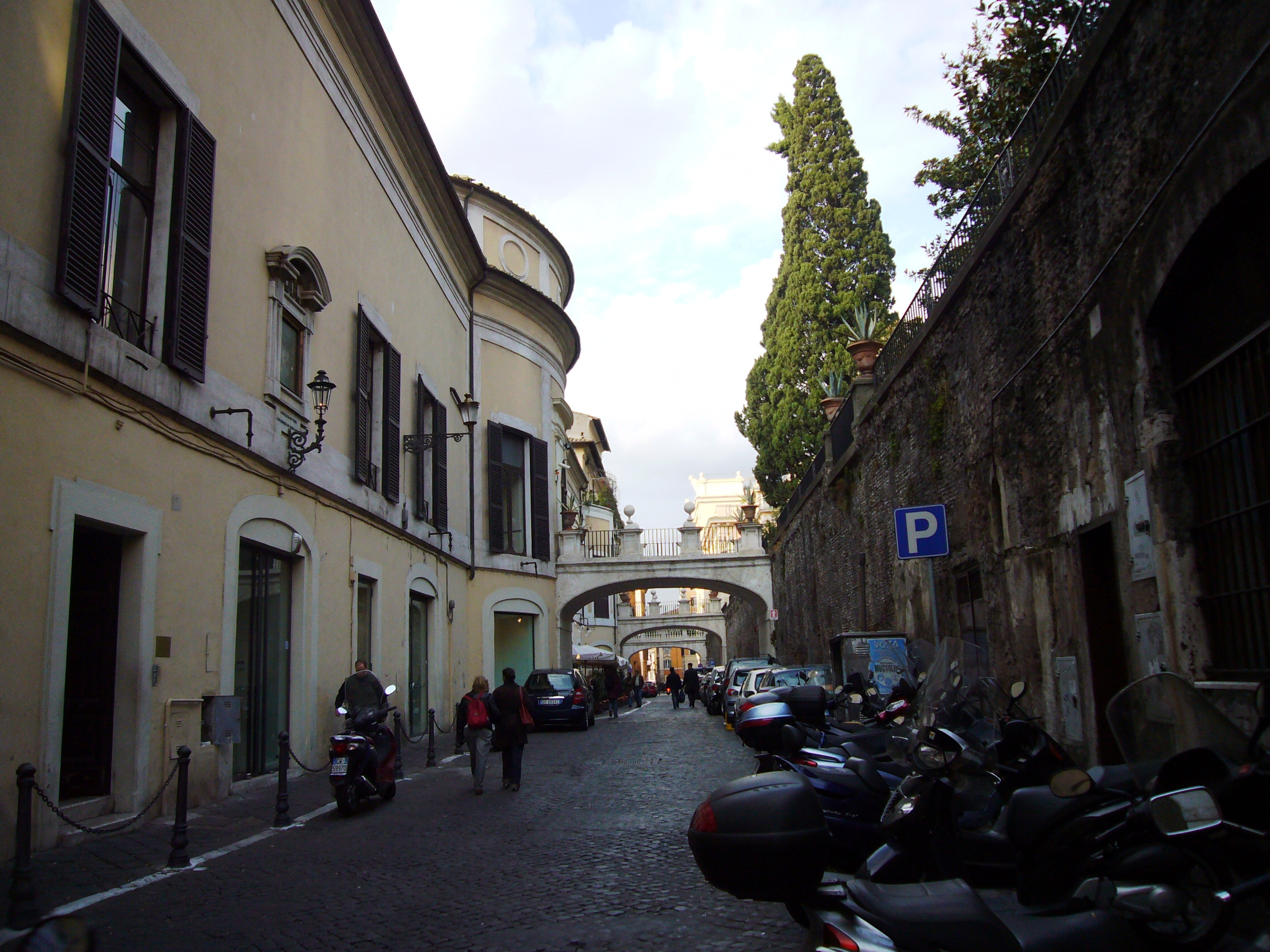 Roma, Palazzo Colonna su via della Pilotta (ingresso alla Galleria Colonna)